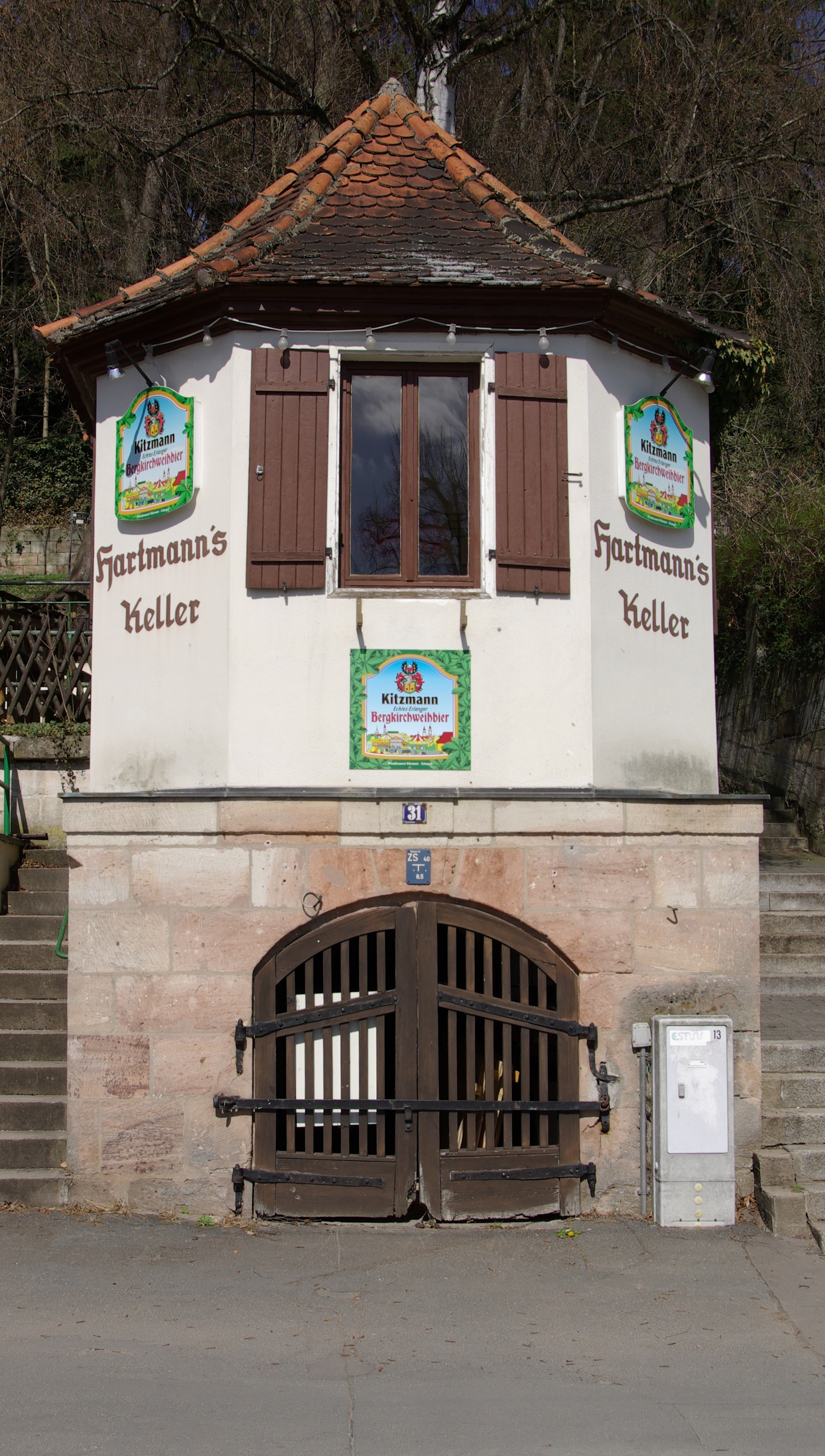 Hartmanns Keller auf den Gelände der Bergkirchweih in Erlangen